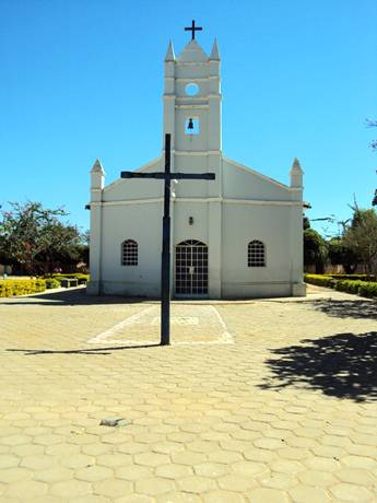 Igreja Senhora Santana situada no bairro Cachoeirinha em Verdelândia-MG